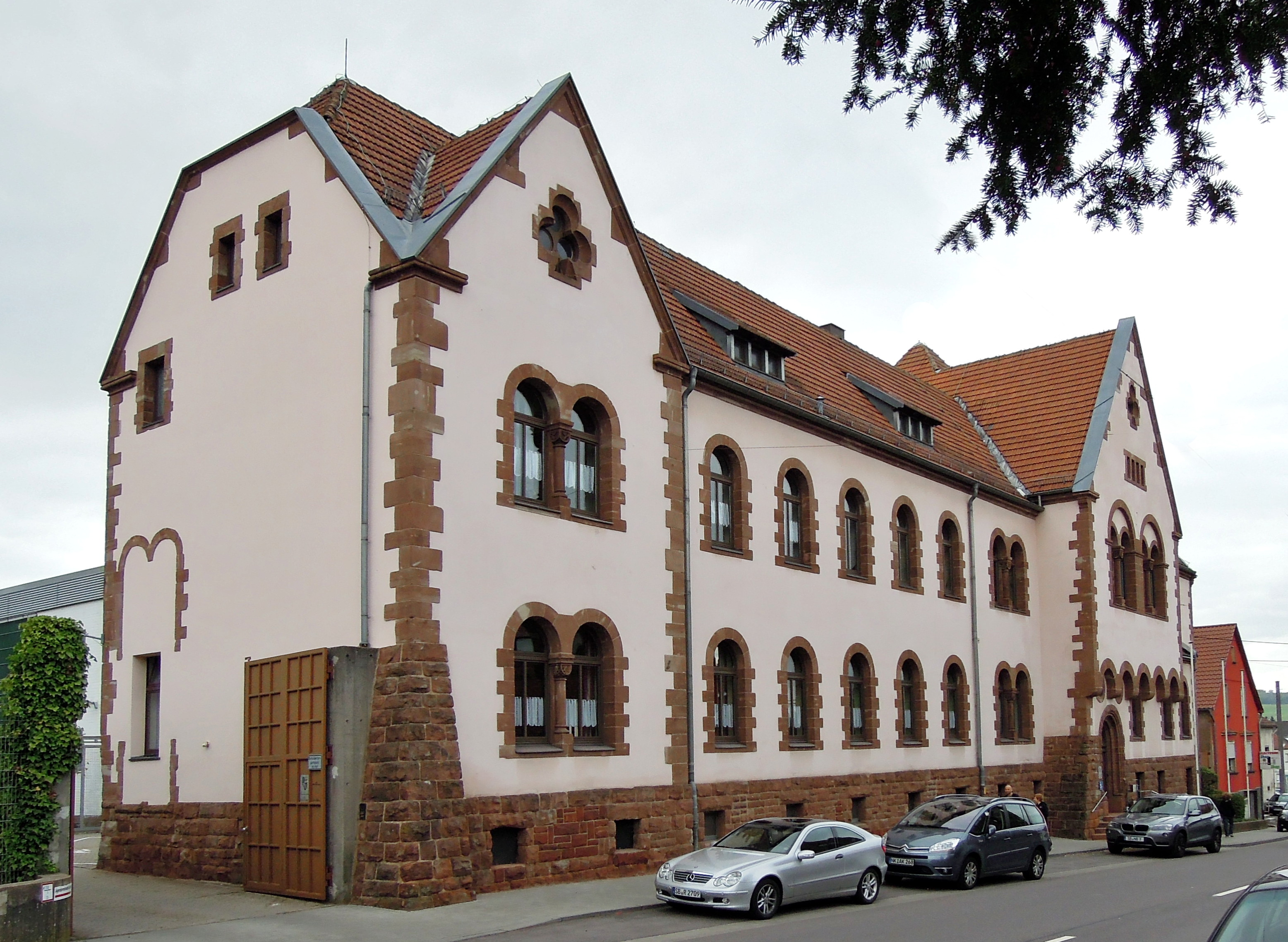 Saarbrücker Straße 10, Amtsgericht mit Gefängnis, 1905-1907 von Matthias Becker (Einzeldenkmal)